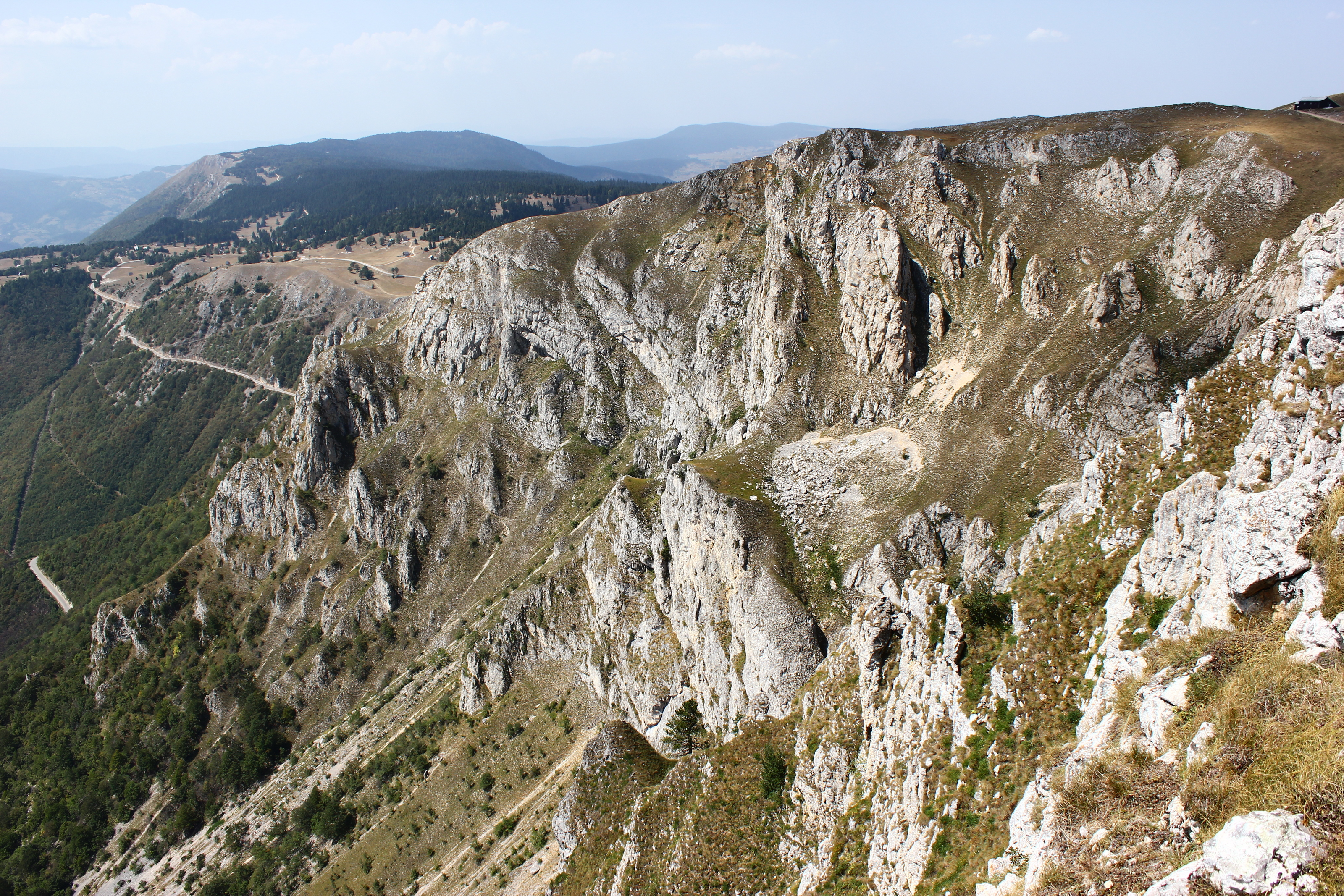 Die Südwand des Vlašić bei Turbe (Bosnien und Herzegowina).